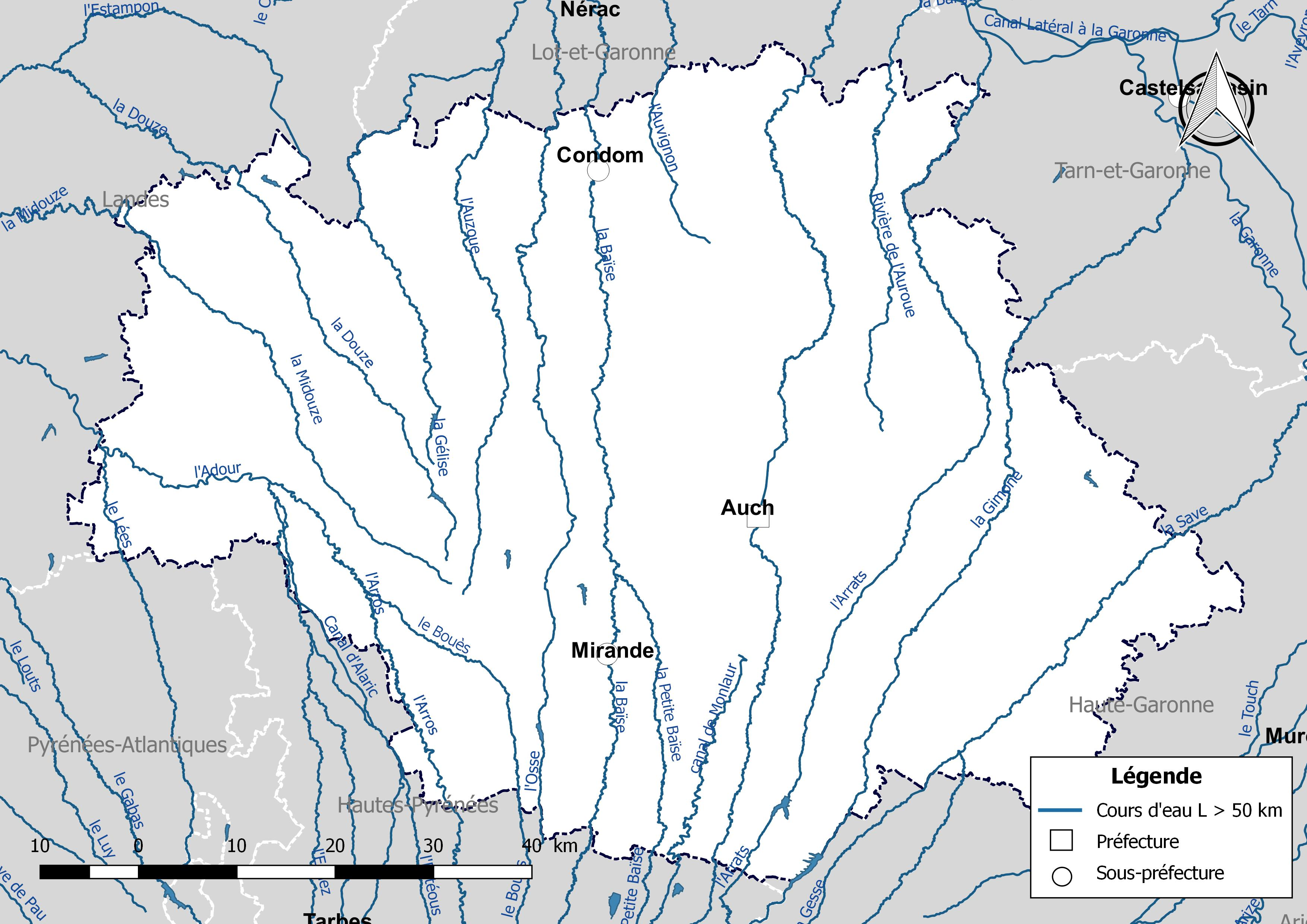 Carte des cours d'eau de longueur supérieure à 50 km drainant le département du Gers (France).